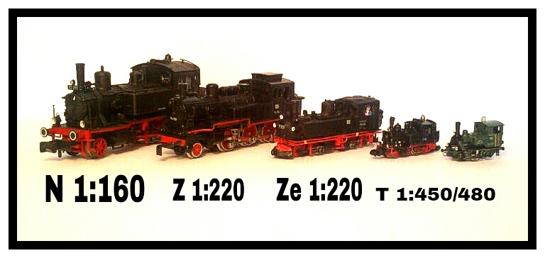 Vergleich N, Z, Ze, T